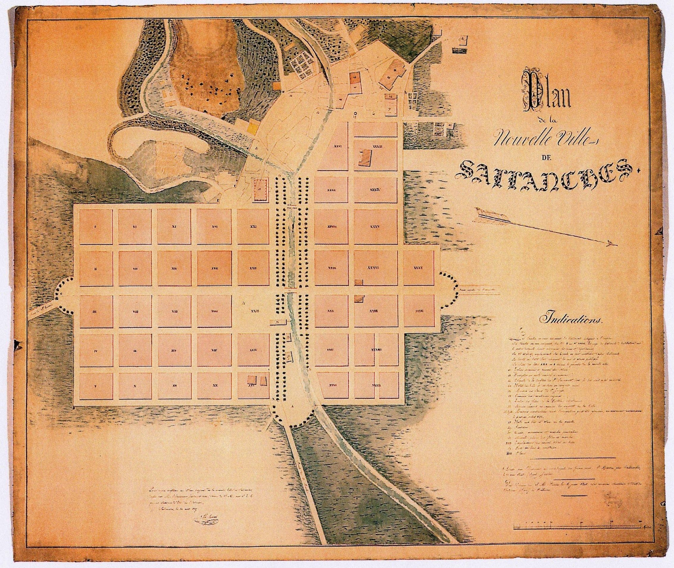 Plan de la nouvelle Ville de Sallanches. François Justin, 1840. Archive Départementales Haute-Savoie.